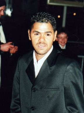 Jamel Debbouze à la cérémonie des Césars.